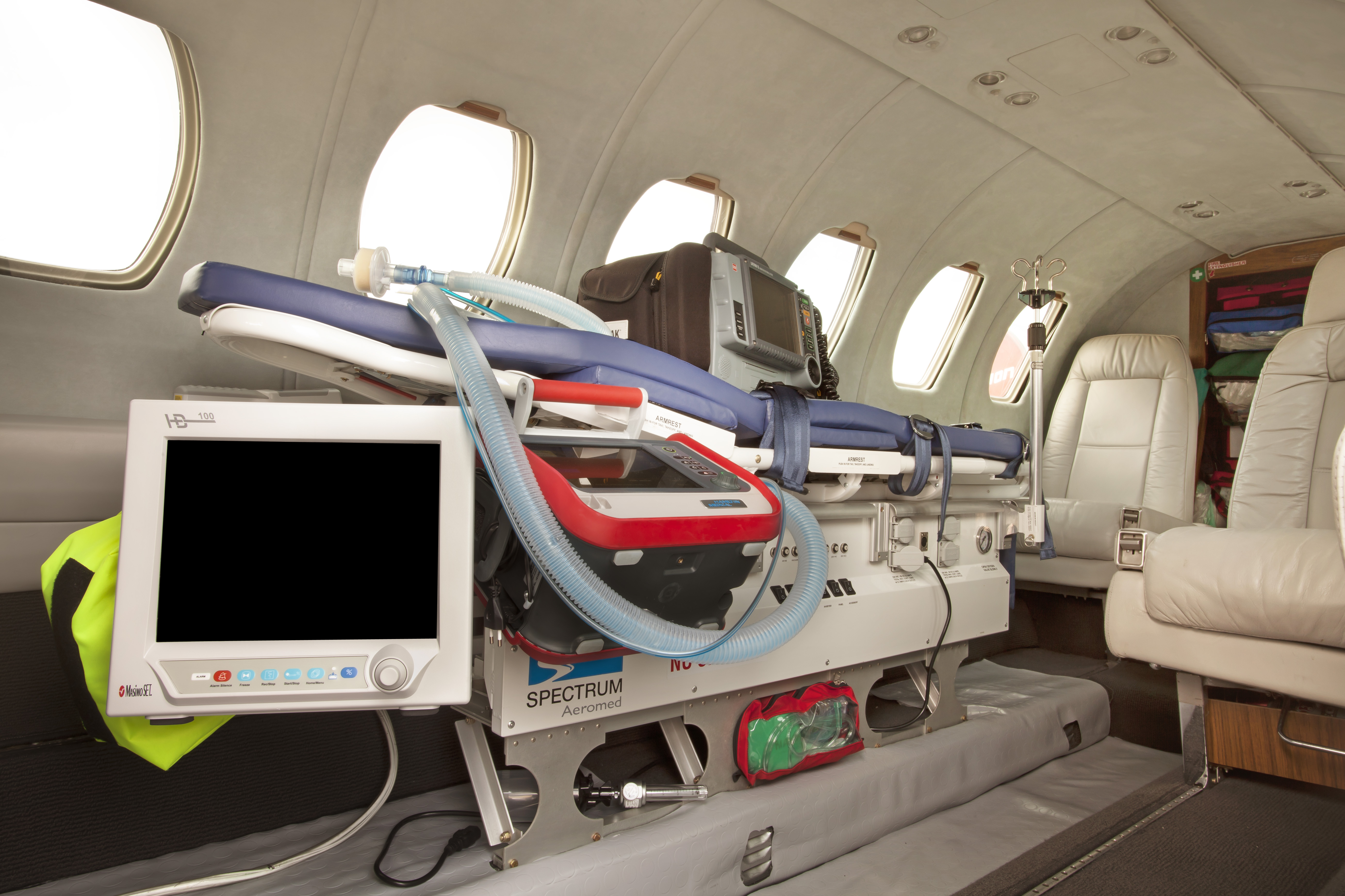 L'interno di un jet Air Medical